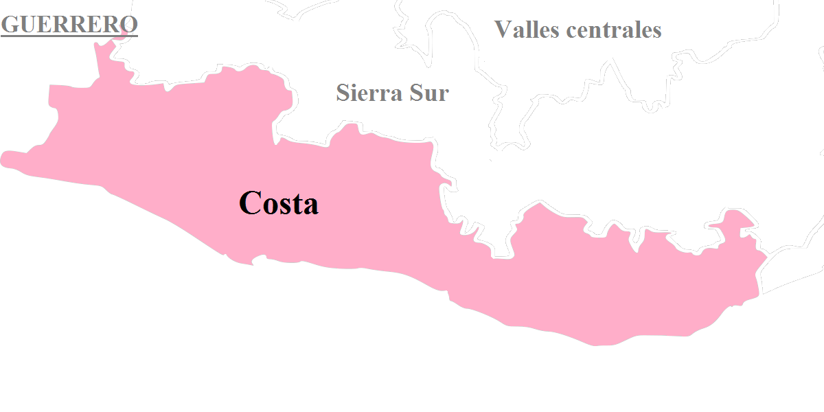 Región Costa, una de las ocho regiones que conforman al estado mexicano de Oaxaca.